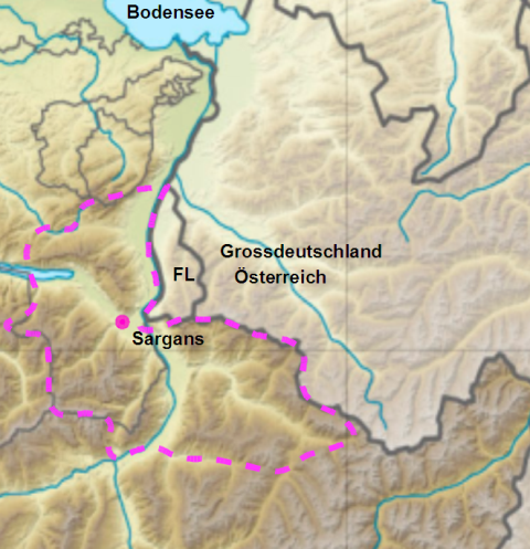 Festungsraum Sargans im Zweiten Weltkrieg, Sargans SG, Schweiz